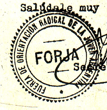 FORJA sello.